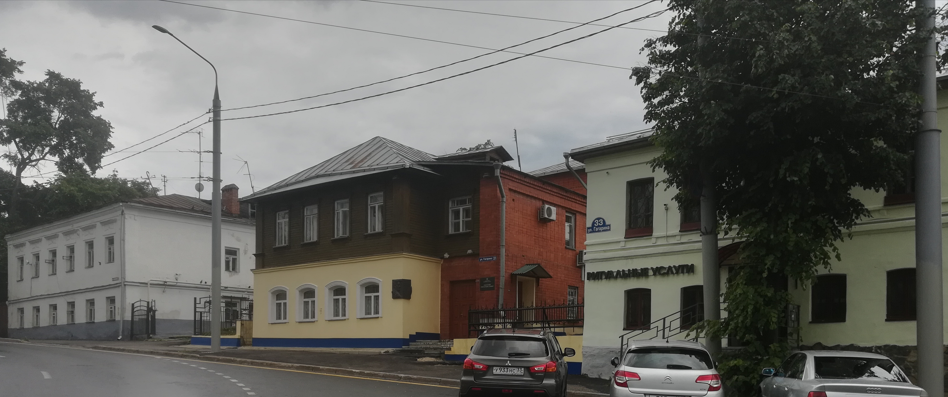 Владимир